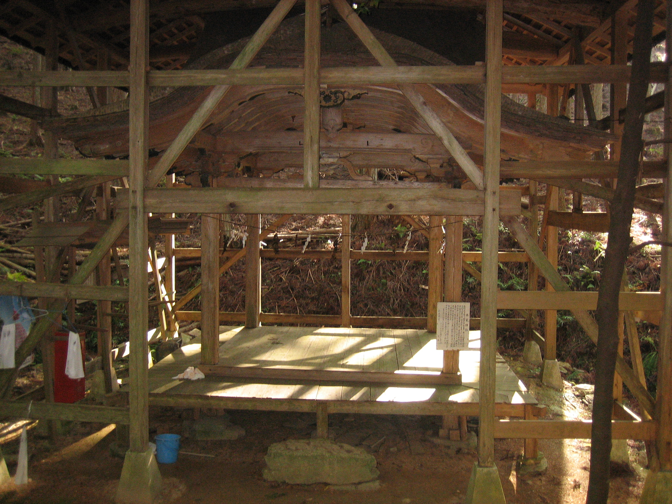 京都市北区西賀茂氷室町から氷室神社を撮影